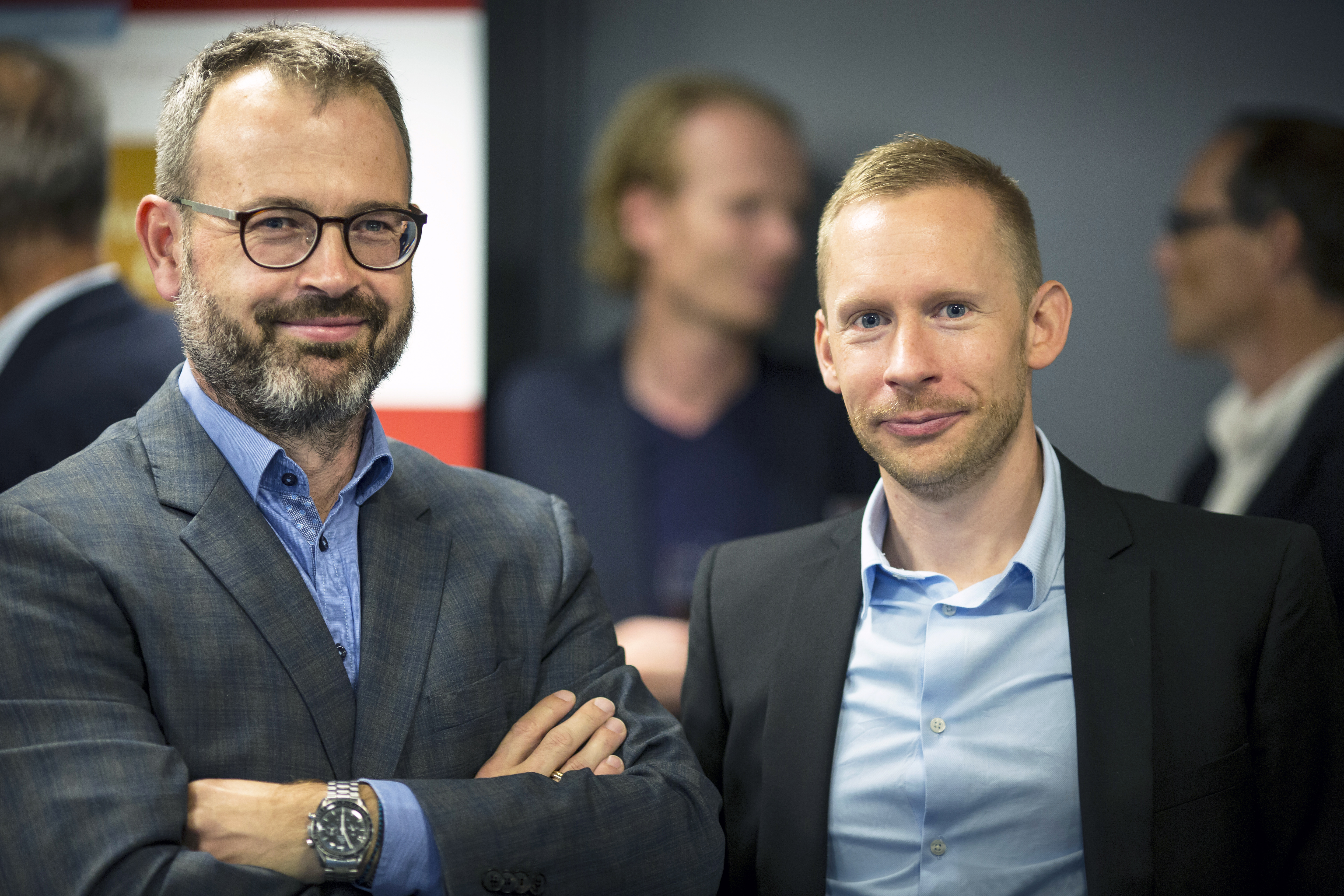 Medicon Valley Alliance styrelseordförande Søren Bregenholt (vice vd Novo Nordisk) och tf CEO Petter Hartman efter ett extra årsmöte där en ny strategi och nya medlemsavgifter beslutades enhälligt. Photo: News Øresund - Johan Wessman © News Øresund(CC BY 3.0) Detta verk av News Øresund är licensierat under en Creative Commons Erkännande 3.0 Unported-licens (CC BY 3.0). Bilden får fritt publiceras under förutsättning att källa anges. The picture can be used freely under the prerequisite that the source is given. News Øresund, Malmö, Sweden. . News Øresund är en oberoende regional nyhetsbyrå som är en del av det oberoende dansk-svenska kunskapscentrat Øresundsinstituttet.